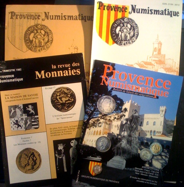 Différentes présentations de Provence Numismatique